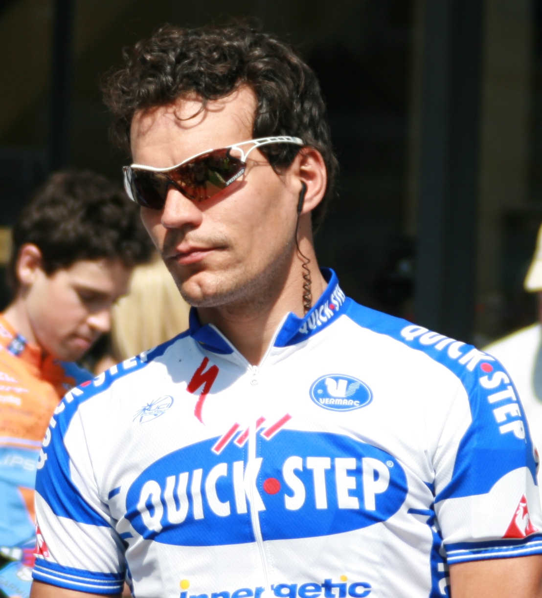 Gert Steegmans aux Quatre Jours de Dunkerque 2008